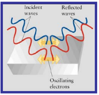 Metalen propietate optikoak